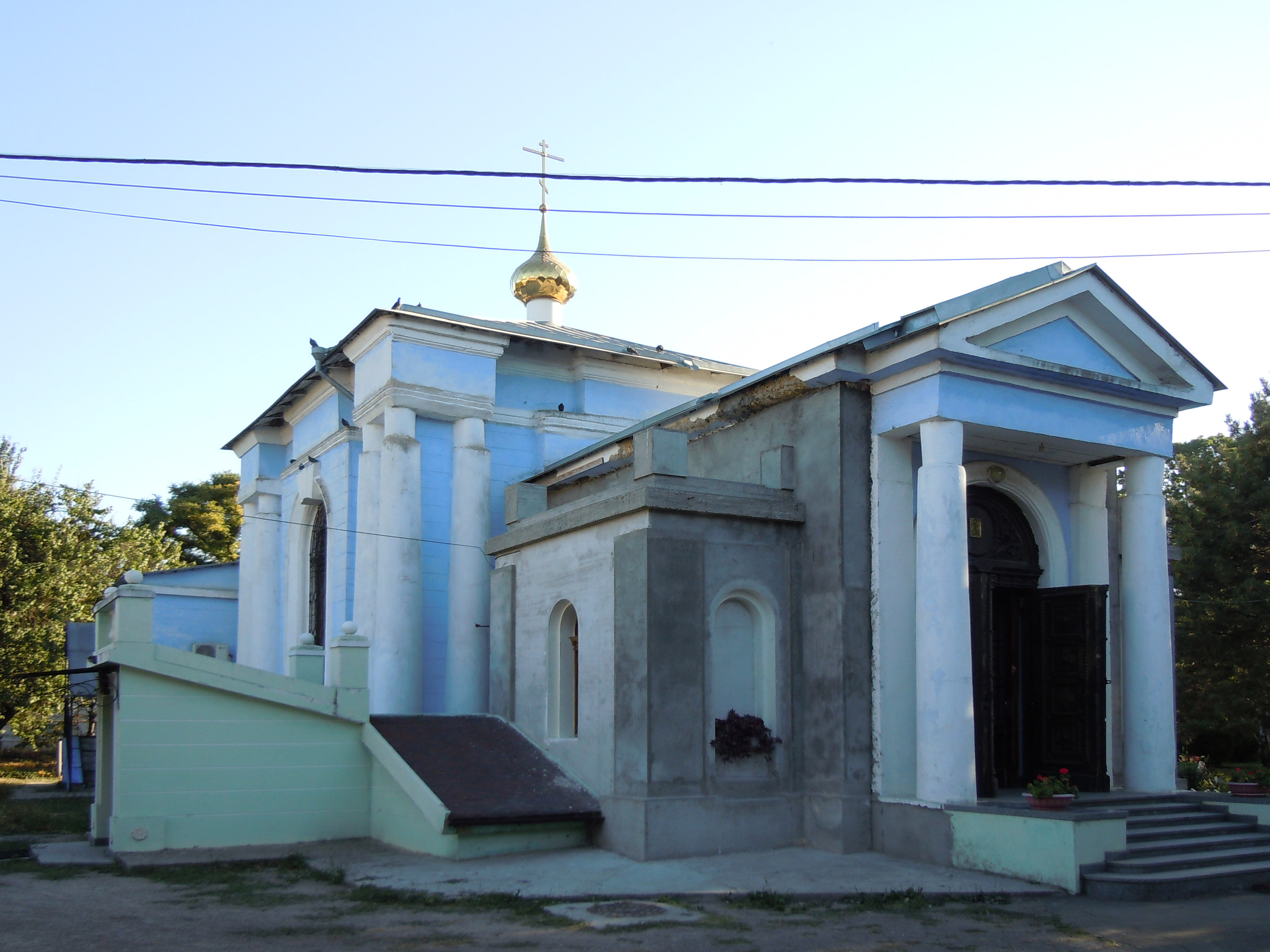 Будівля церкви Миколи та Аріадни, Одеса, Удільний пров., 1